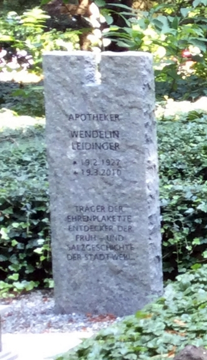 Grabstein für Wendelin Leidinger, ehemaliger Ortsheimatpfleger